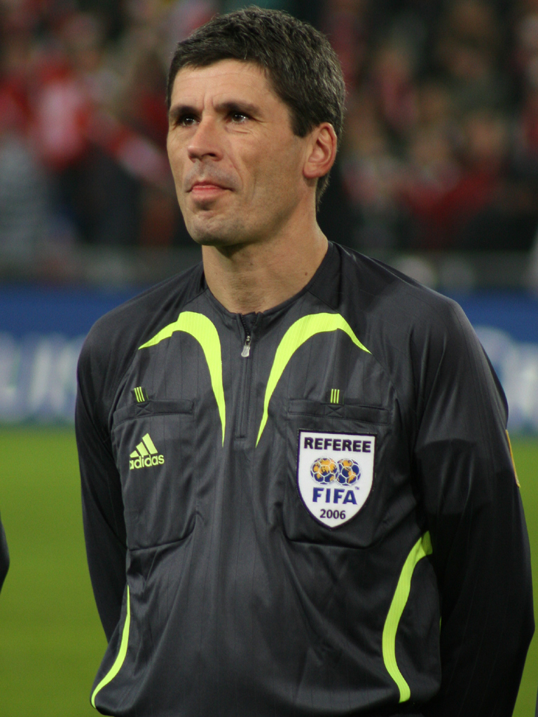 Markus Merk, St. Jakob Stadion, Basel (Switzerland), Switzerland - Brasil 1:2